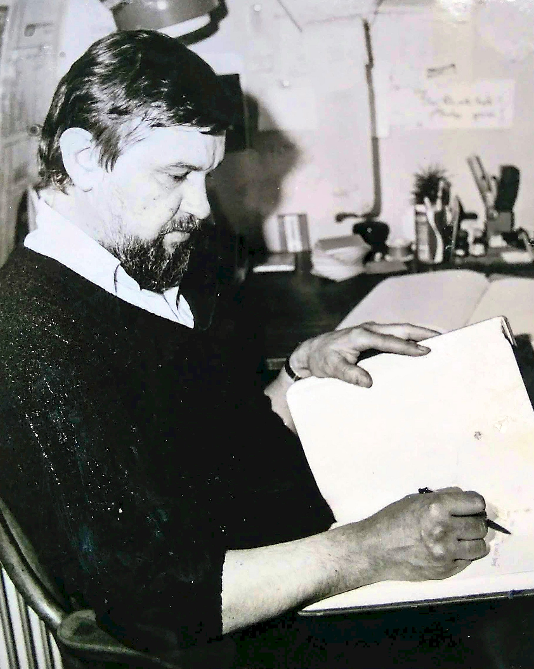 Vladimír Renčín, beseda v OKM Kroměříž 25.3.1985